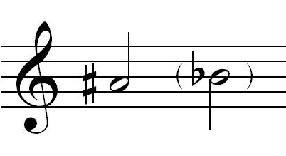 Srpskohrvatski / српскохрватски: Enharmonska zamena ais1 - be1, autor Radivoj Lazić, lični rad, 6. 10. 2012. godine.